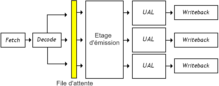 OOO Issue